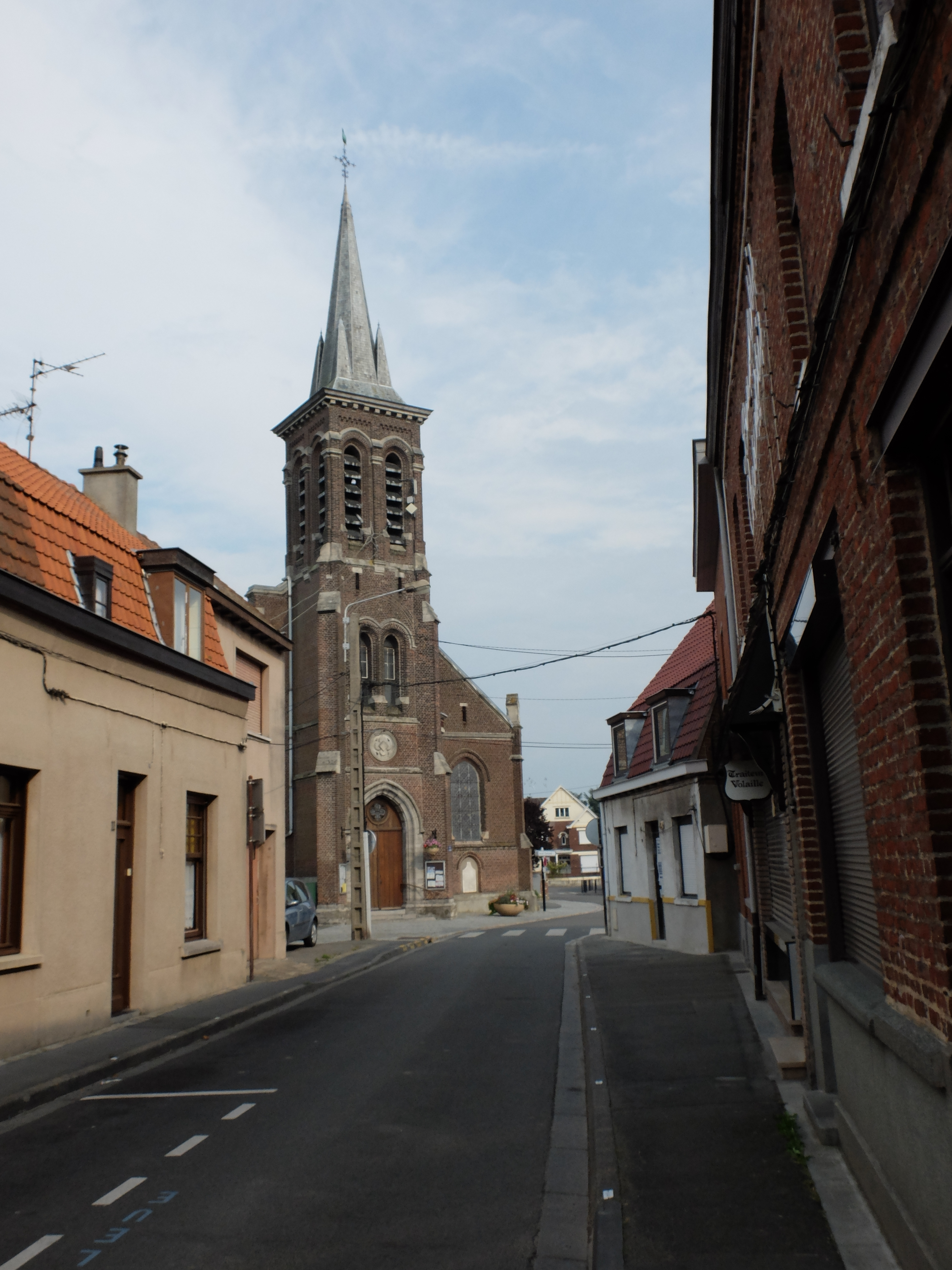 Vue de l'église de Toufflers.